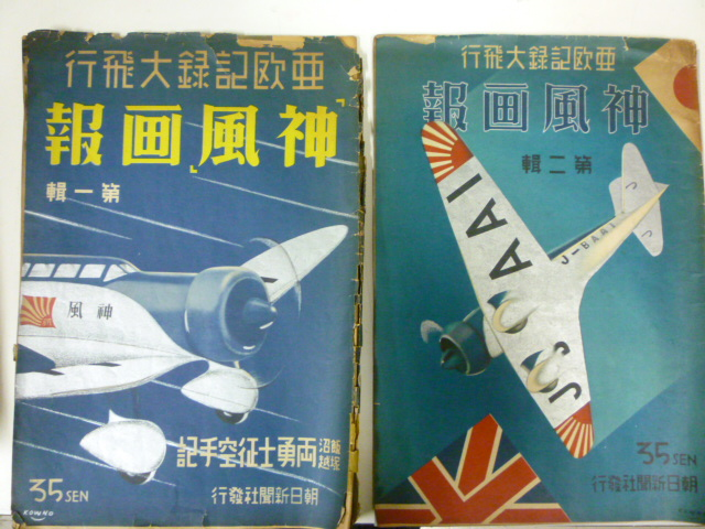 『亜欧記録大飛行 神風画報』の第一輯と第二輯([1])。